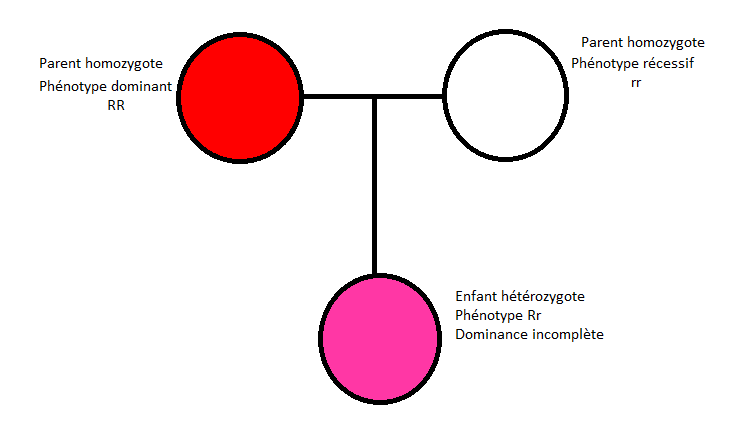 Schéma d'un exemple de dominance incomplète